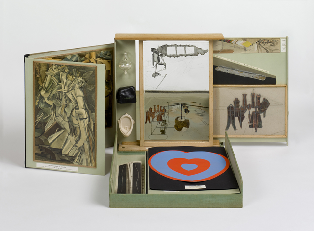 "La boîte verte" (La caja verde) de Marcel Duchamp -1934. Es considerada el primer libro de artista. Realizada con cartón, fotografía en blanco y negro, tela y notas manuscritas. Contiene noventa y cuatro facsímiles de fotografías, dibujos y notas, fechados entre 1911 y 1915. Sus dimensiones son de 33,2 x 28 x 2,5 cm.